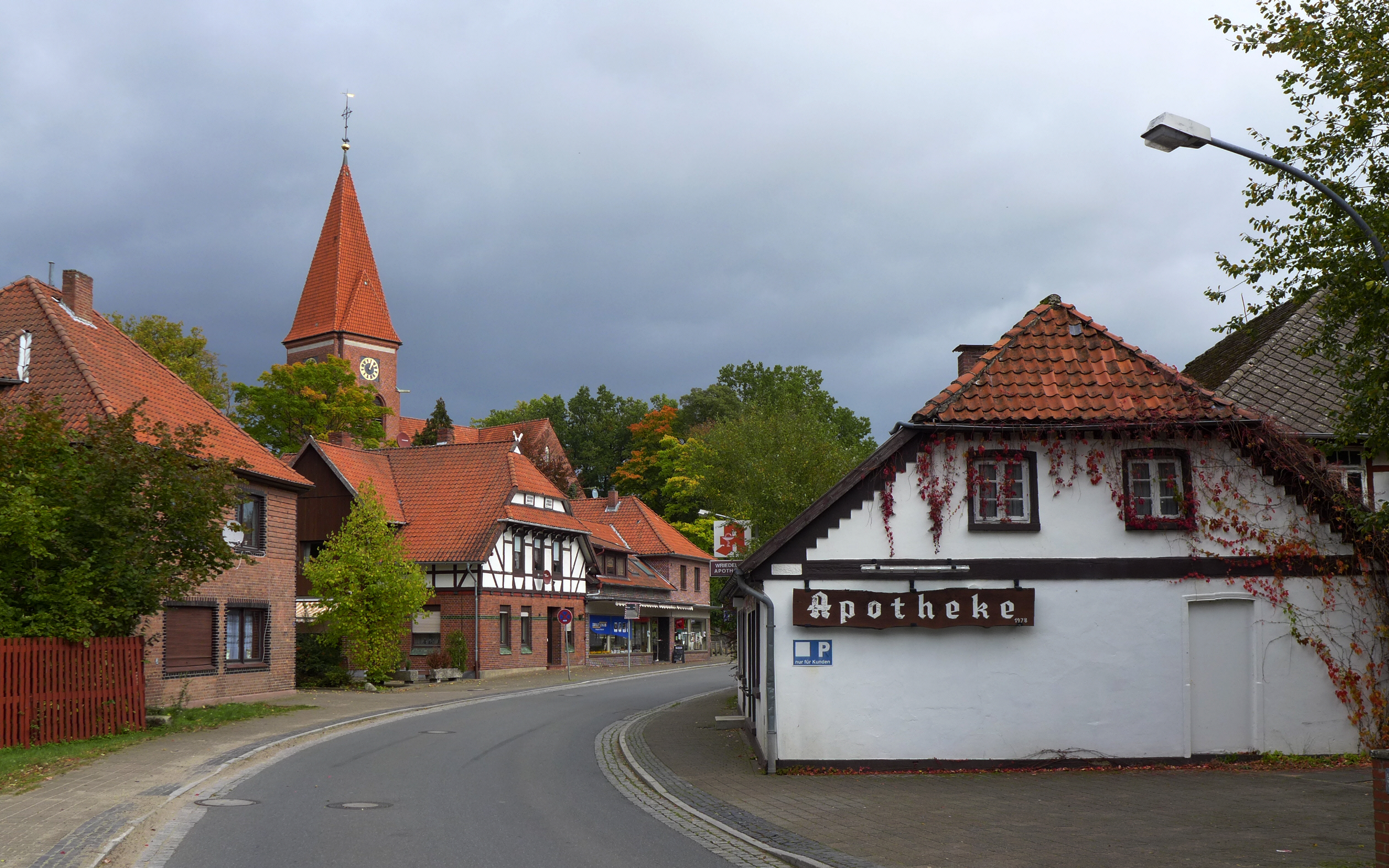 Blick auf den Ortskern von Wriedel mit dem Turm der Suidbertkirche im Hintergrund. Im Vordergrund rechts die Wriedeler Apotheke. Nachtrag vom 30.12.2016: Diese Apotheke wurde ersetzt durch einen Apothekenneubau in der Entfernung von wenigen Schritten. Siehe hierzu "File:Wriedel - Apotheke.jpg".